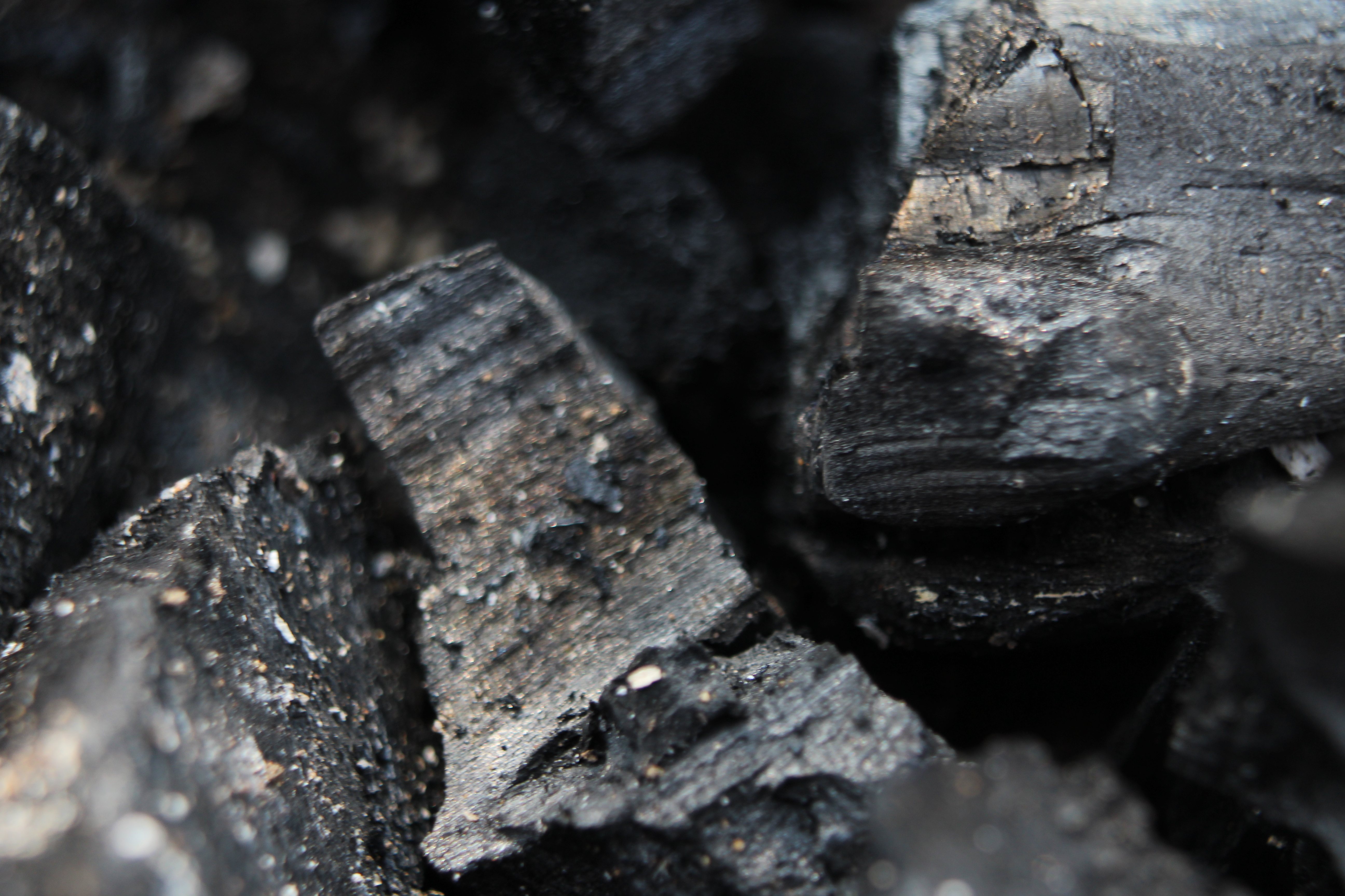 פחם שחור שצולם בעדשת מאקרו אשר מדגישה את הפרטים הקטנים שאינם נראים לעין. עדשת מקרו מבליטה את עומק השדה.